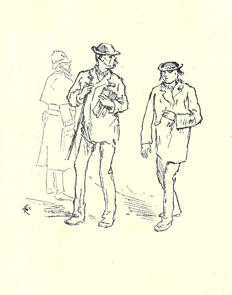 Rimbaud et Verlaine dans une rue de Londres (Rimbaud and Verlaine in a London street) par Félix Régamey (1844-1907)